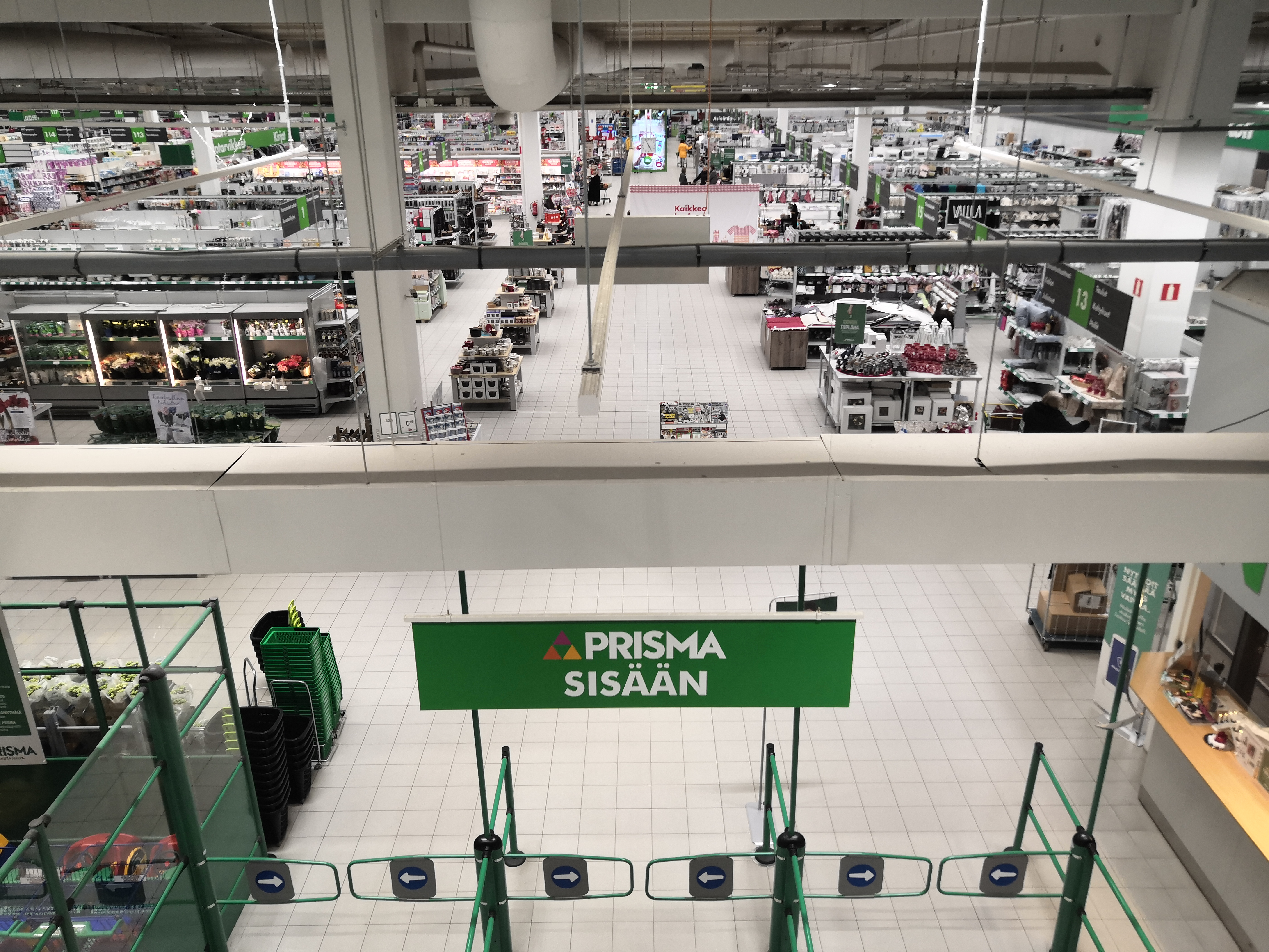 Suomen kolmanneksi suurimman Prisma-hypermarketin eli Kouvolan Prisman sisäänkäynti